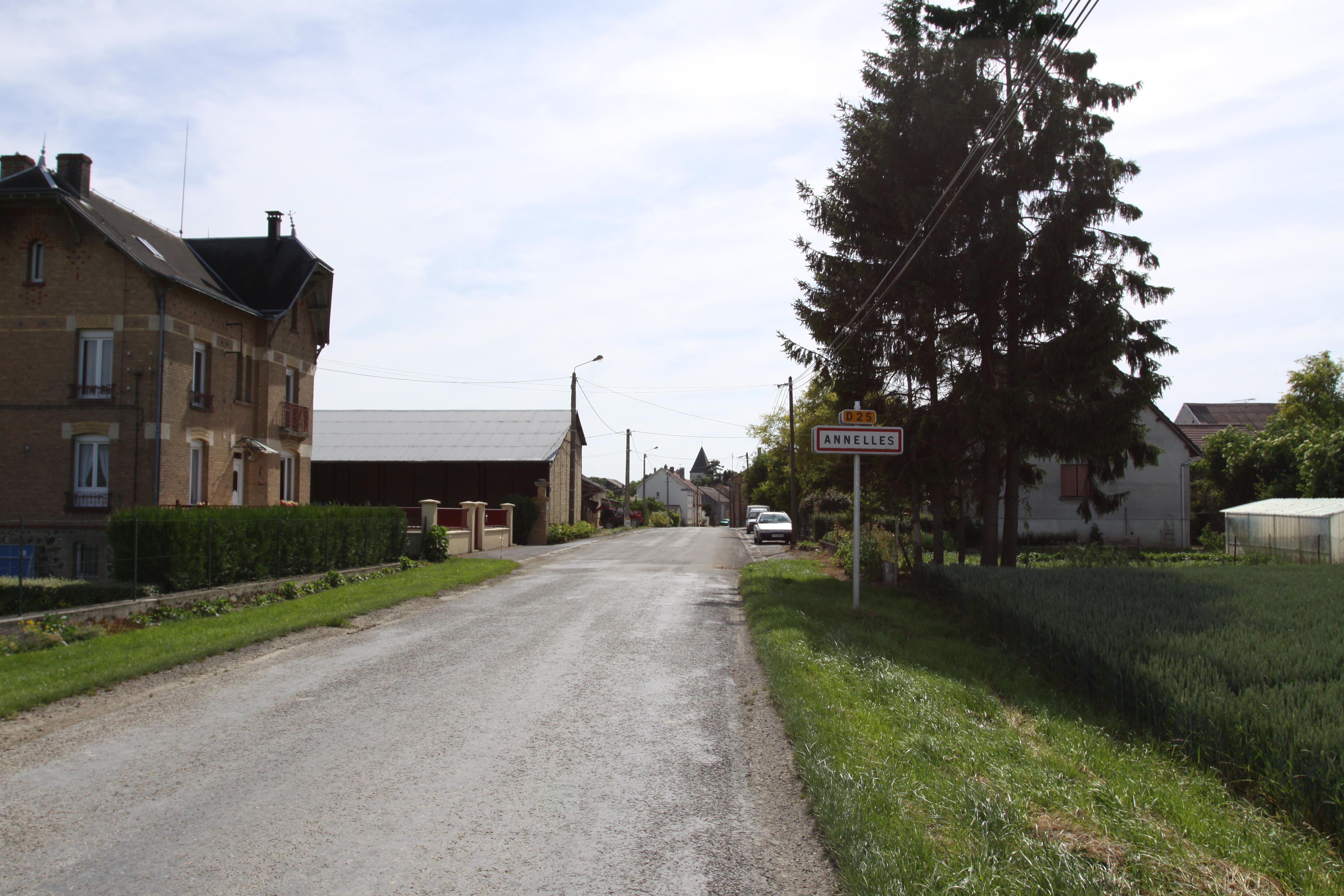 Village Ardennais